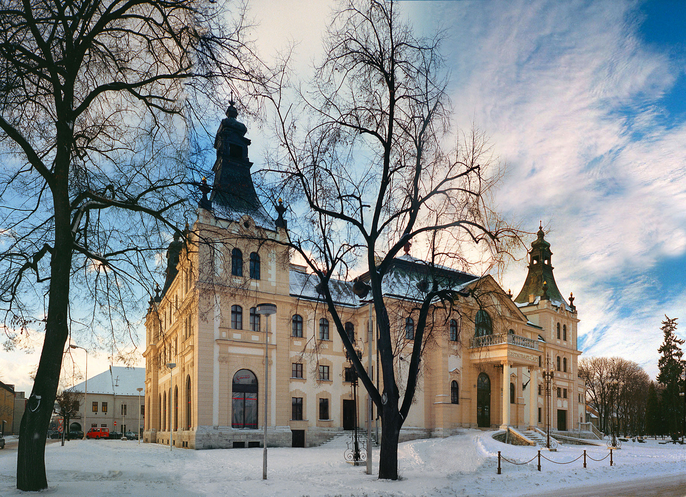 Reduta